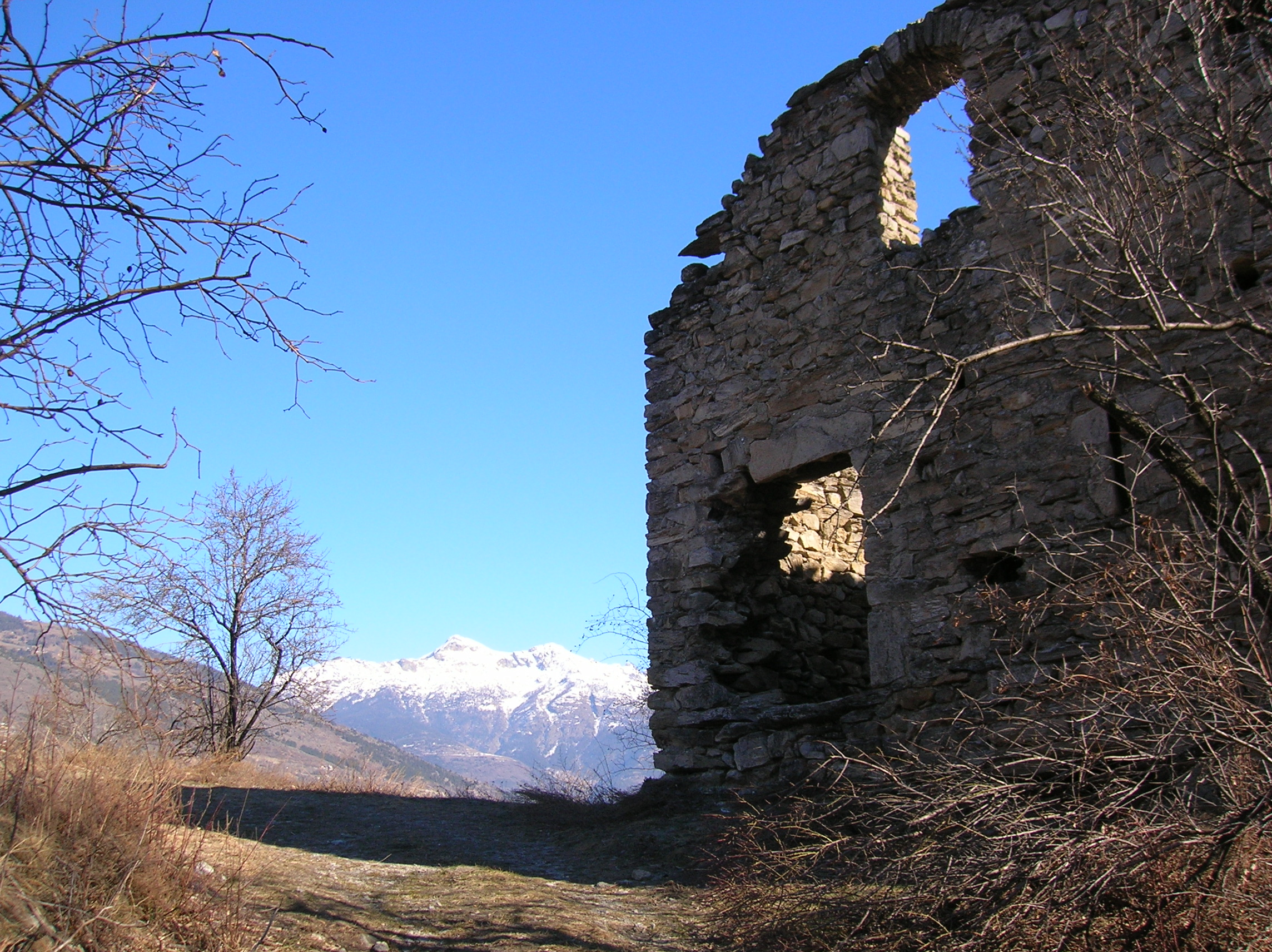 Torre dei Salassi in inverno, a Jovençan, Valle d'Aosta, Italia.